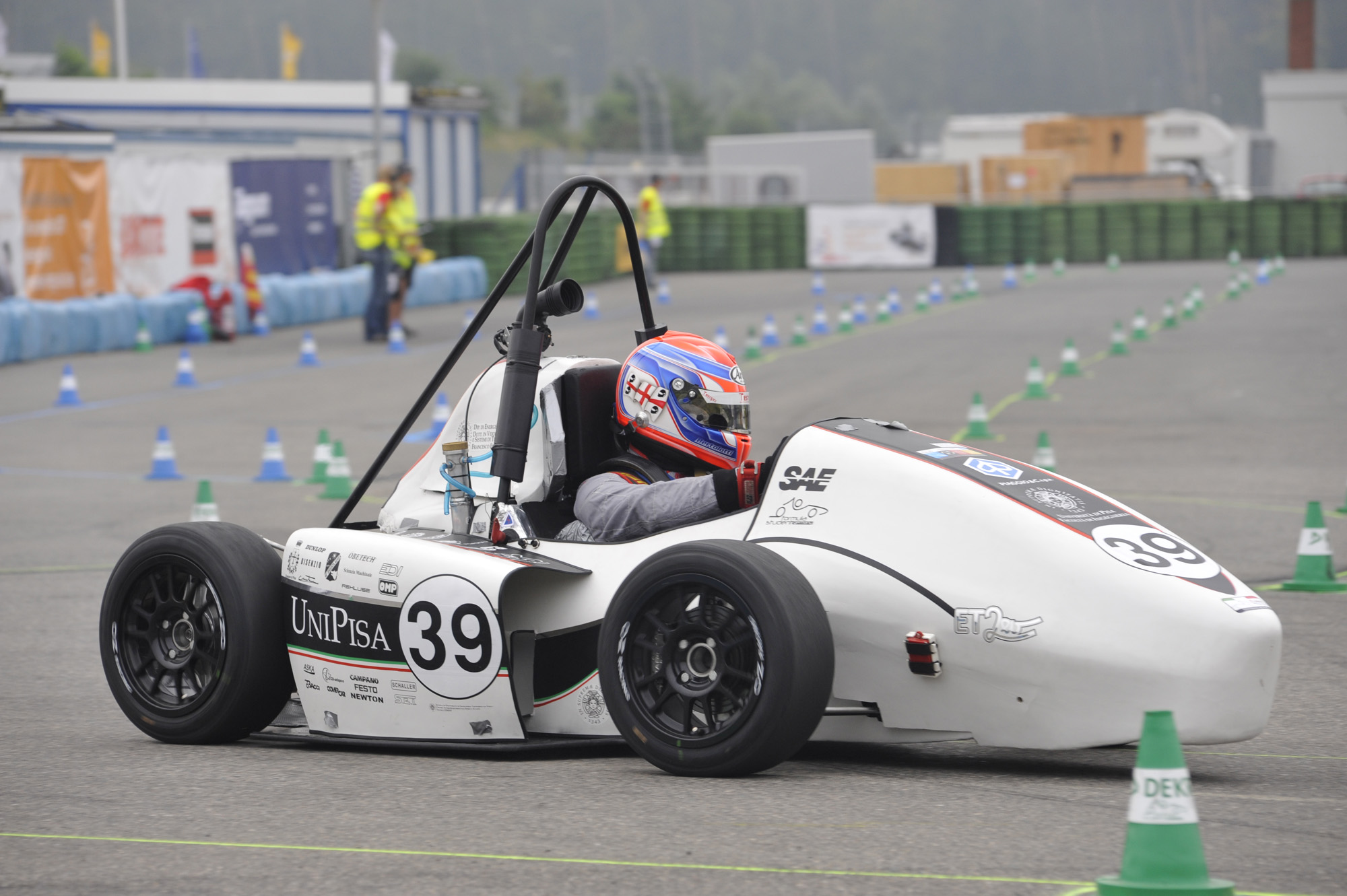 ET2ev durante l'endurance a FSG 2009.